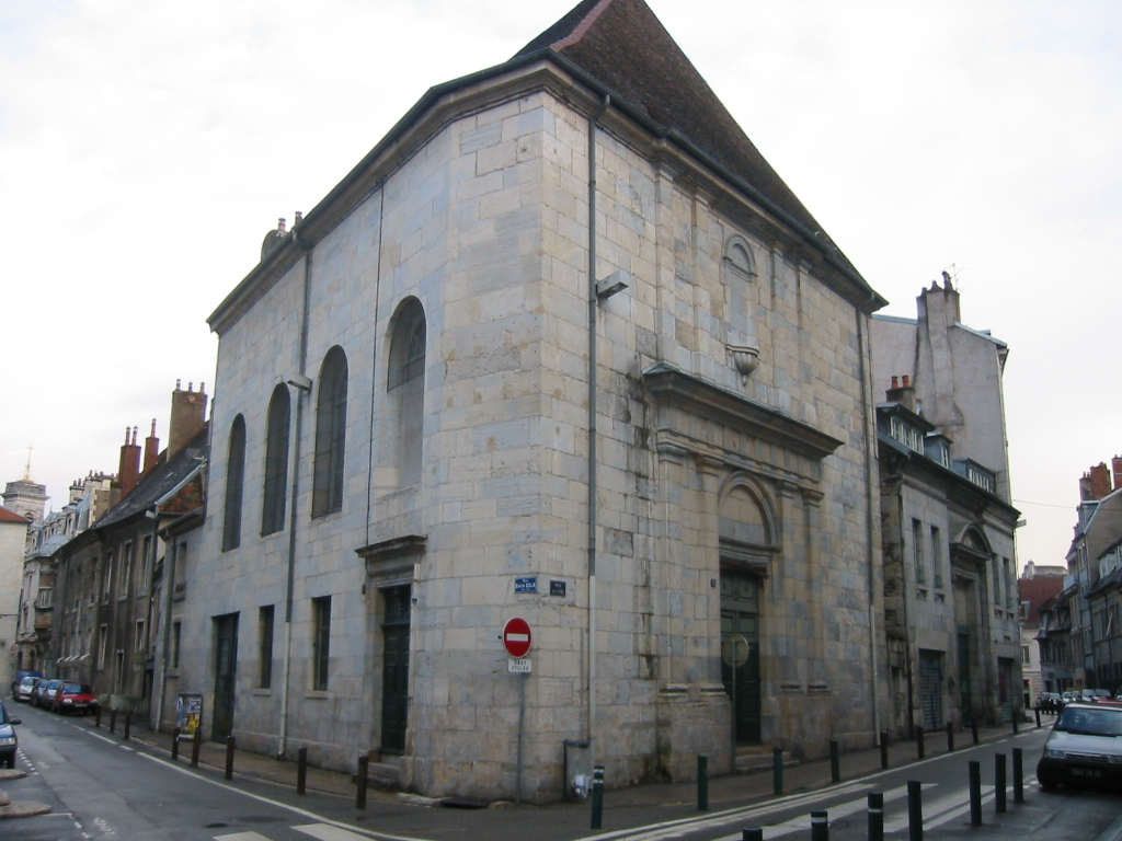 Temple Franc Macon mutli obédience de Besançon Rue Emile Zola